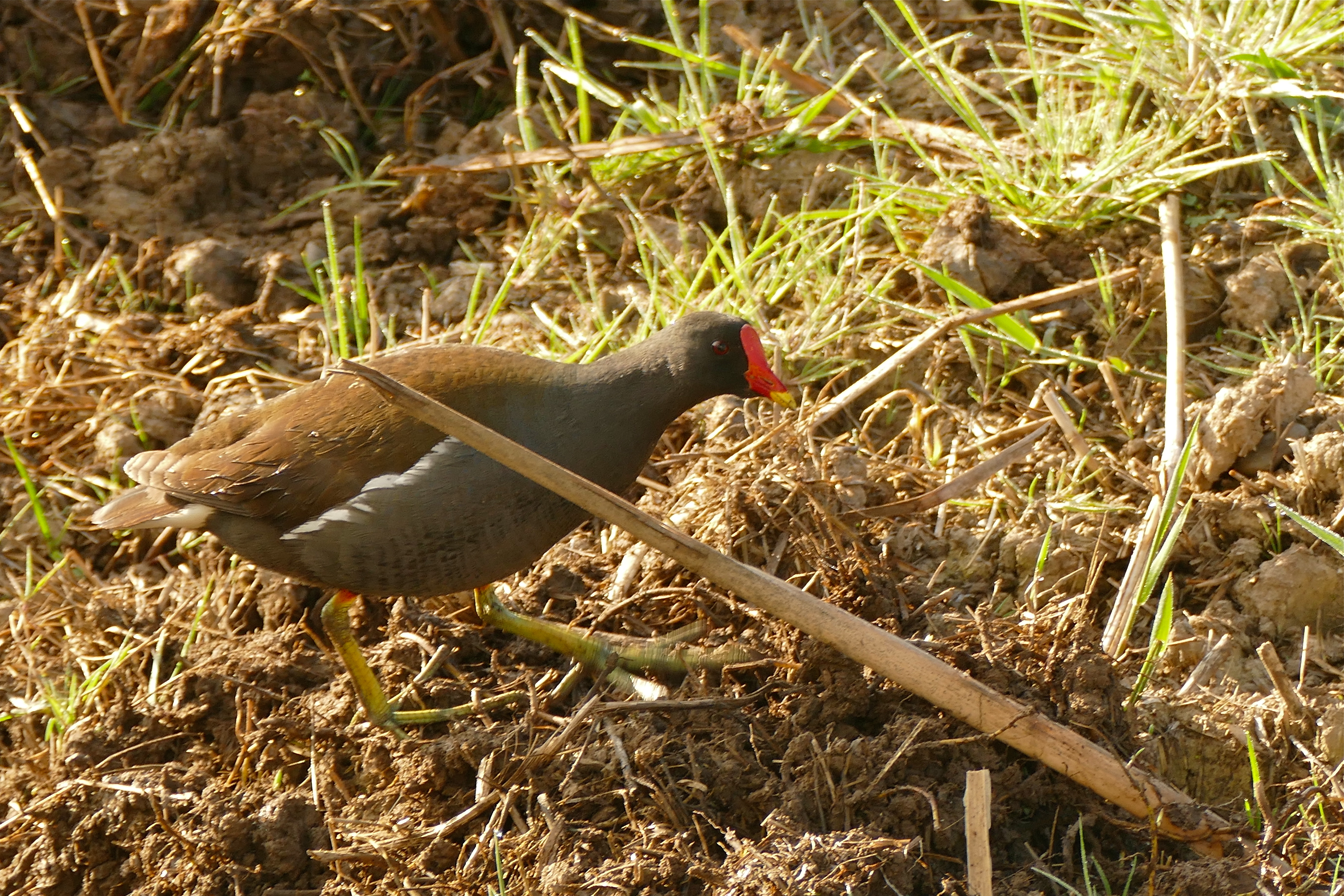 Aguait del Matar, Estanys del Matar, Los Aiguamolls del' Empordà, Castelló d'Empúries, Catalunya, SPAIN